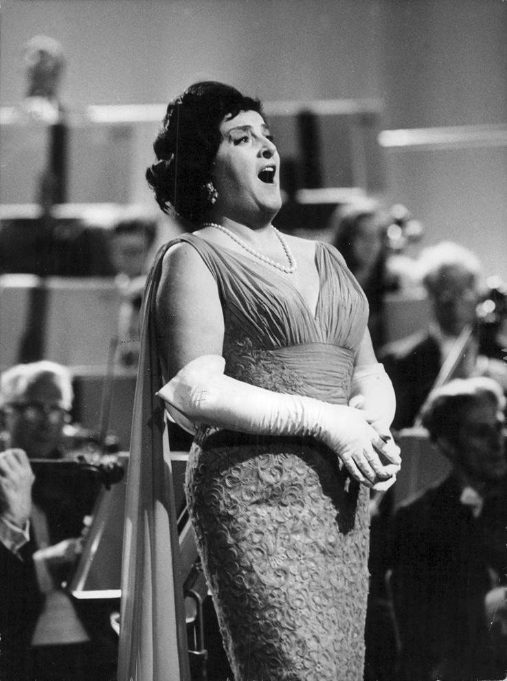 Birgit Nilssons stora operakoncert i TV bandades på onsdagen och bilden visar den stora stjärnan i full aktion.Foto:S/31.7.63